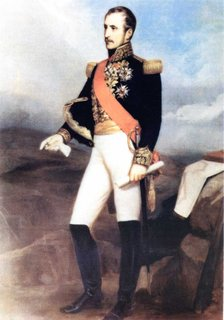 General Simon Bernard (1779-1839), french general